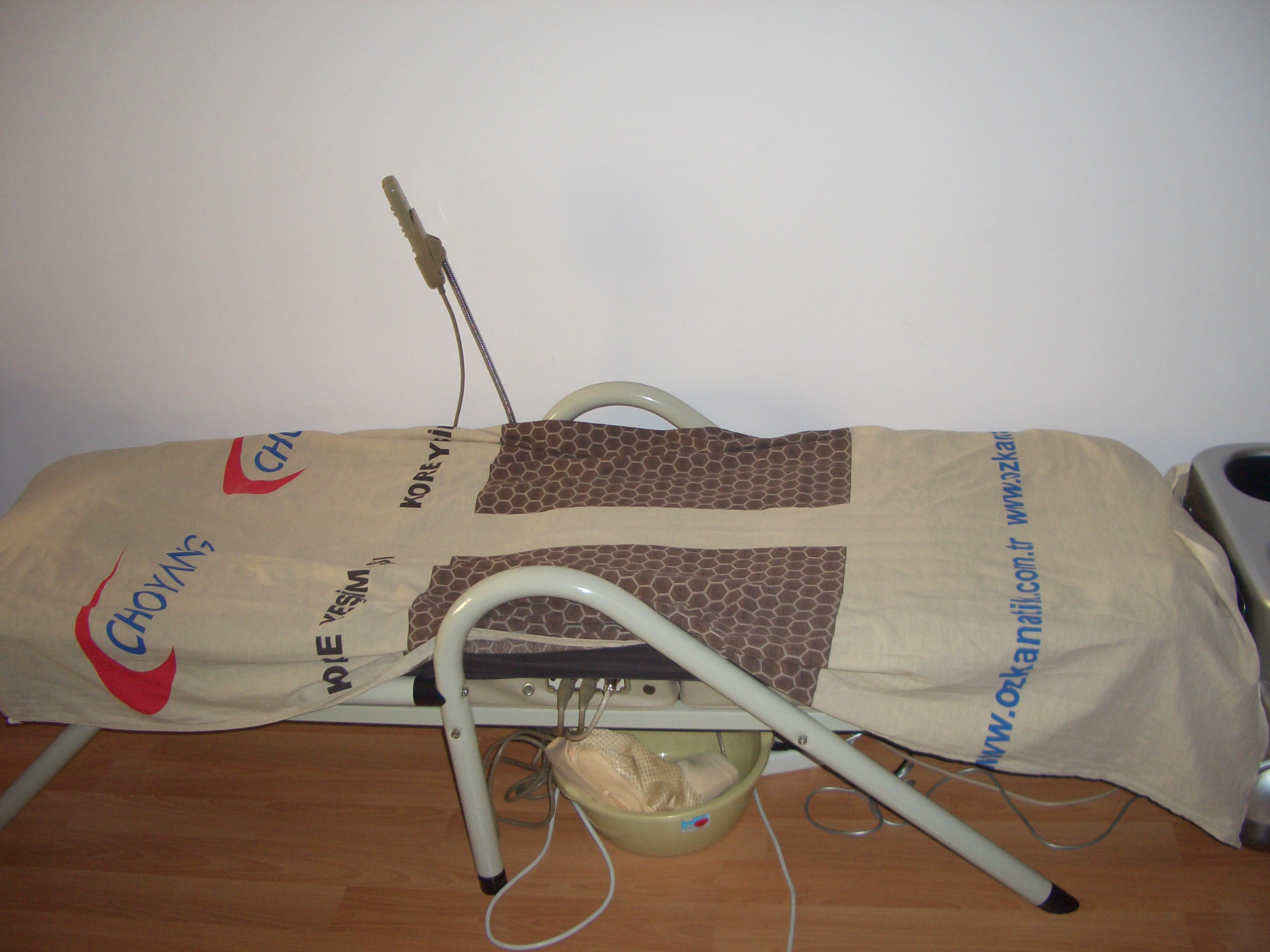 Choyang termal masaj yatağı